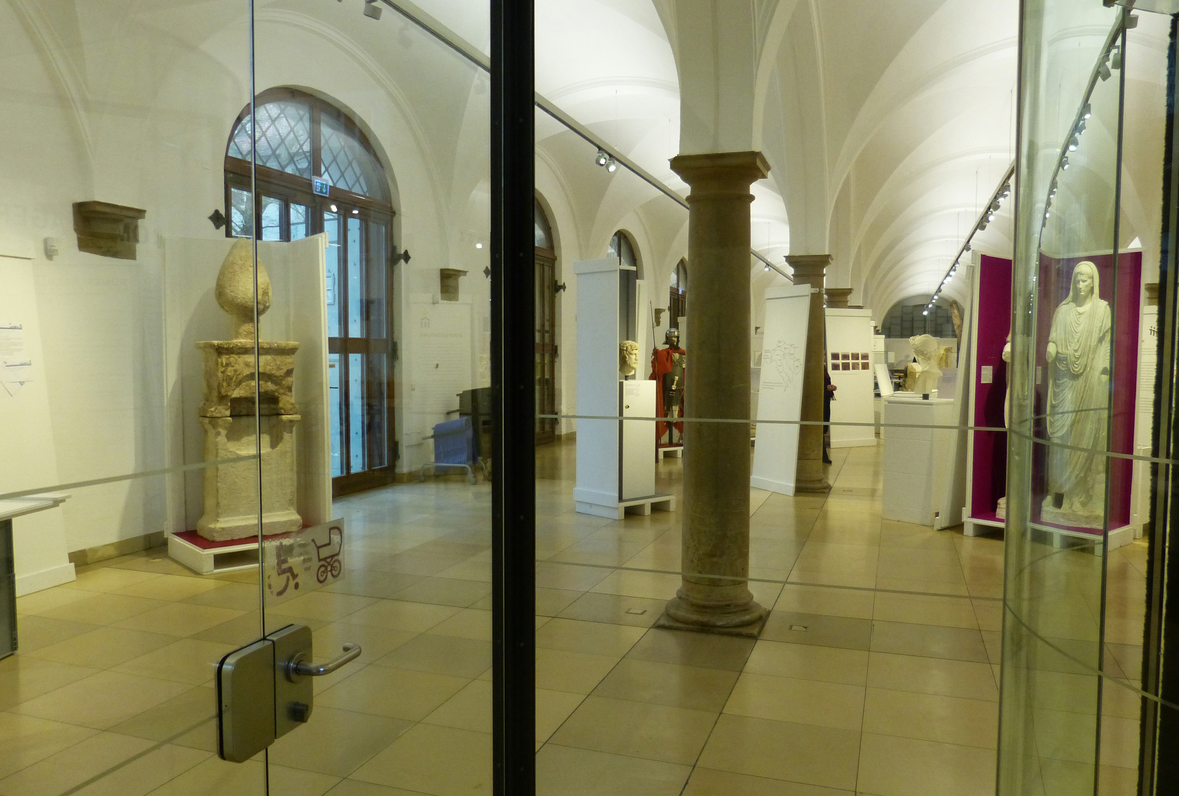 Ausstellung "Römerlager. Das römische Augsburg in Kisten" des Römischen Museums Augsburg, in der Toskanischen Säulenhalle des Zeughauses. Blick durch die Eingangstüre.